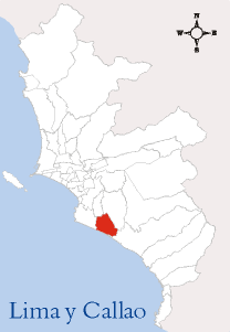 Localización del Distrito de Villa El Salvador Imagen elaborada por --Edgardo Reyes 22:23 9 mar, 2005 (CET) Categoría:Mapas del Perú (imagen)